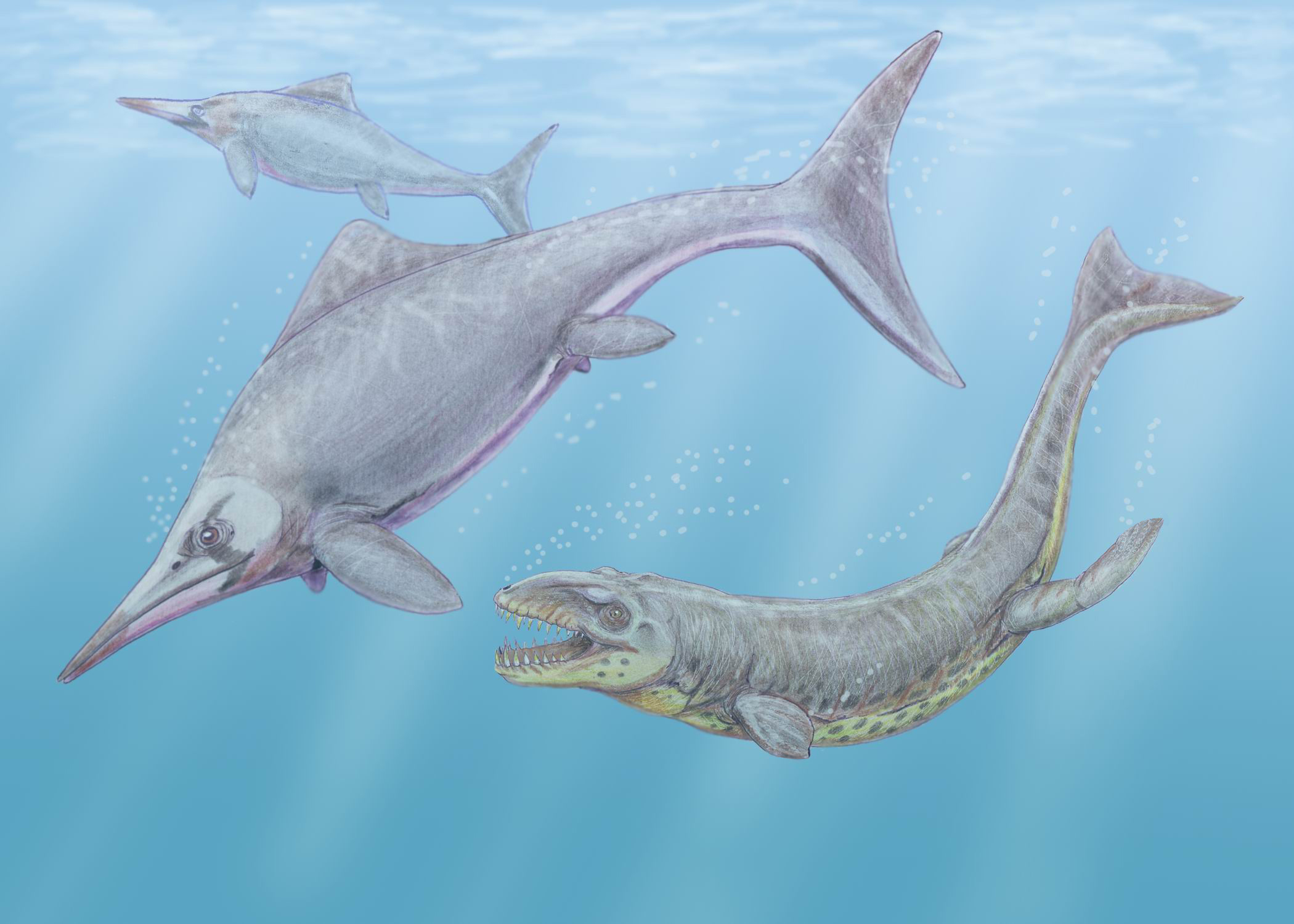 Dakosaurus andinensis on right & Caypullisaurus on left